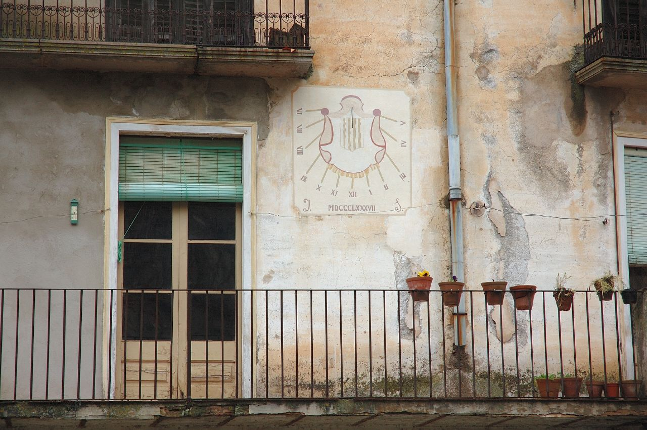 Rellotge de sol a Porrera, Priorat, (Catalunya).